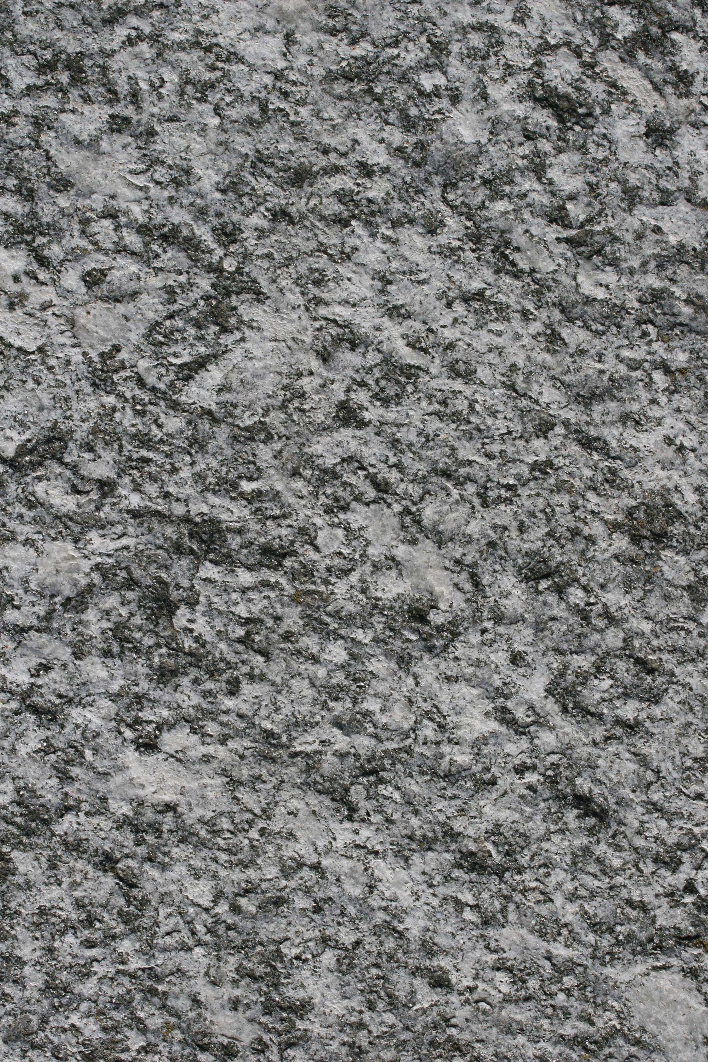 Sarizzo Gneis, beflammt, (Muster ca. 25 x 15 cm)